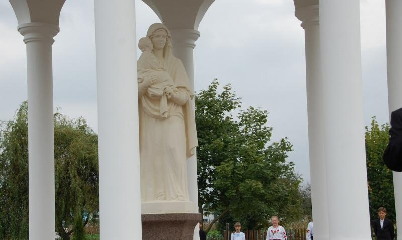 Ротонда